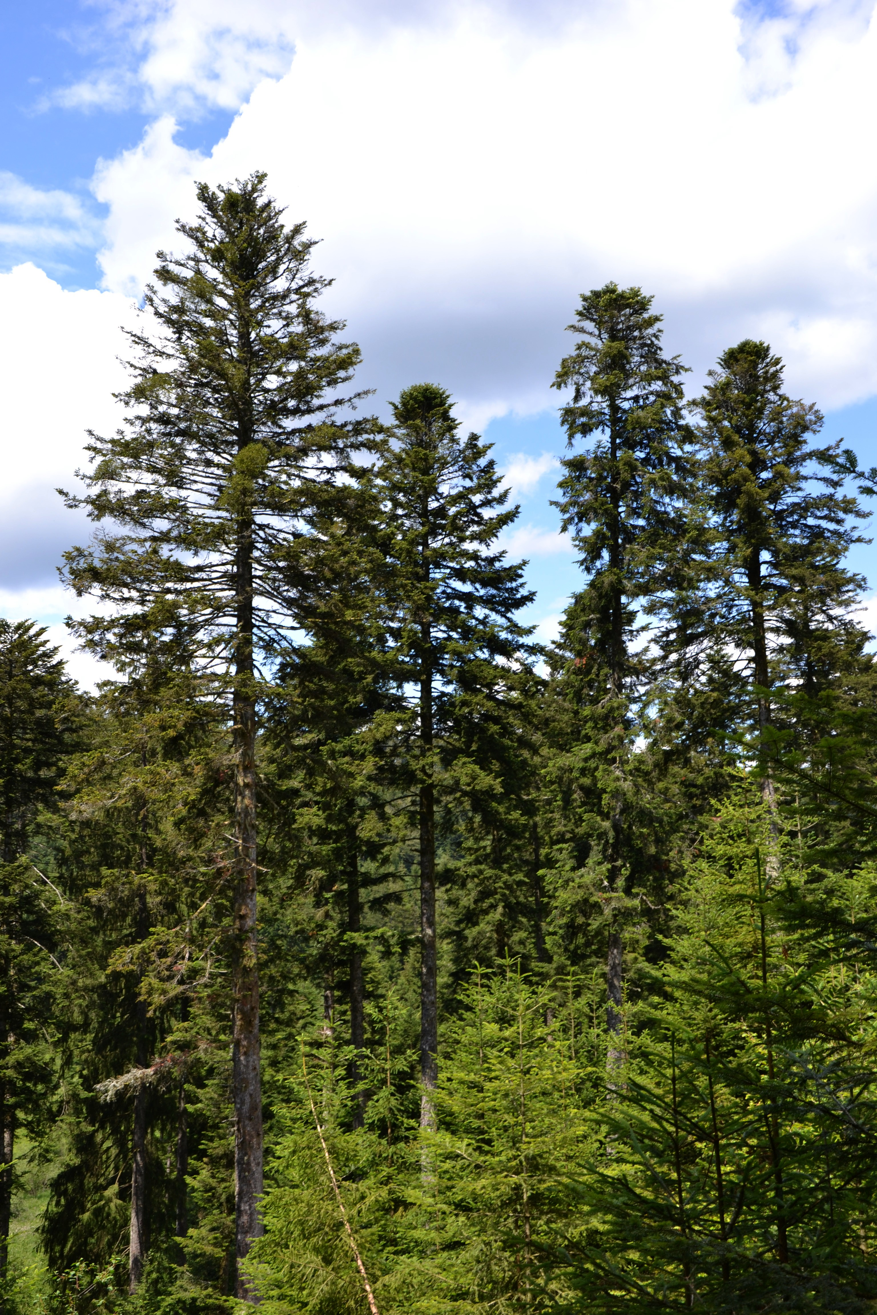 Sapins pectinés, Le Tholy, Vosges